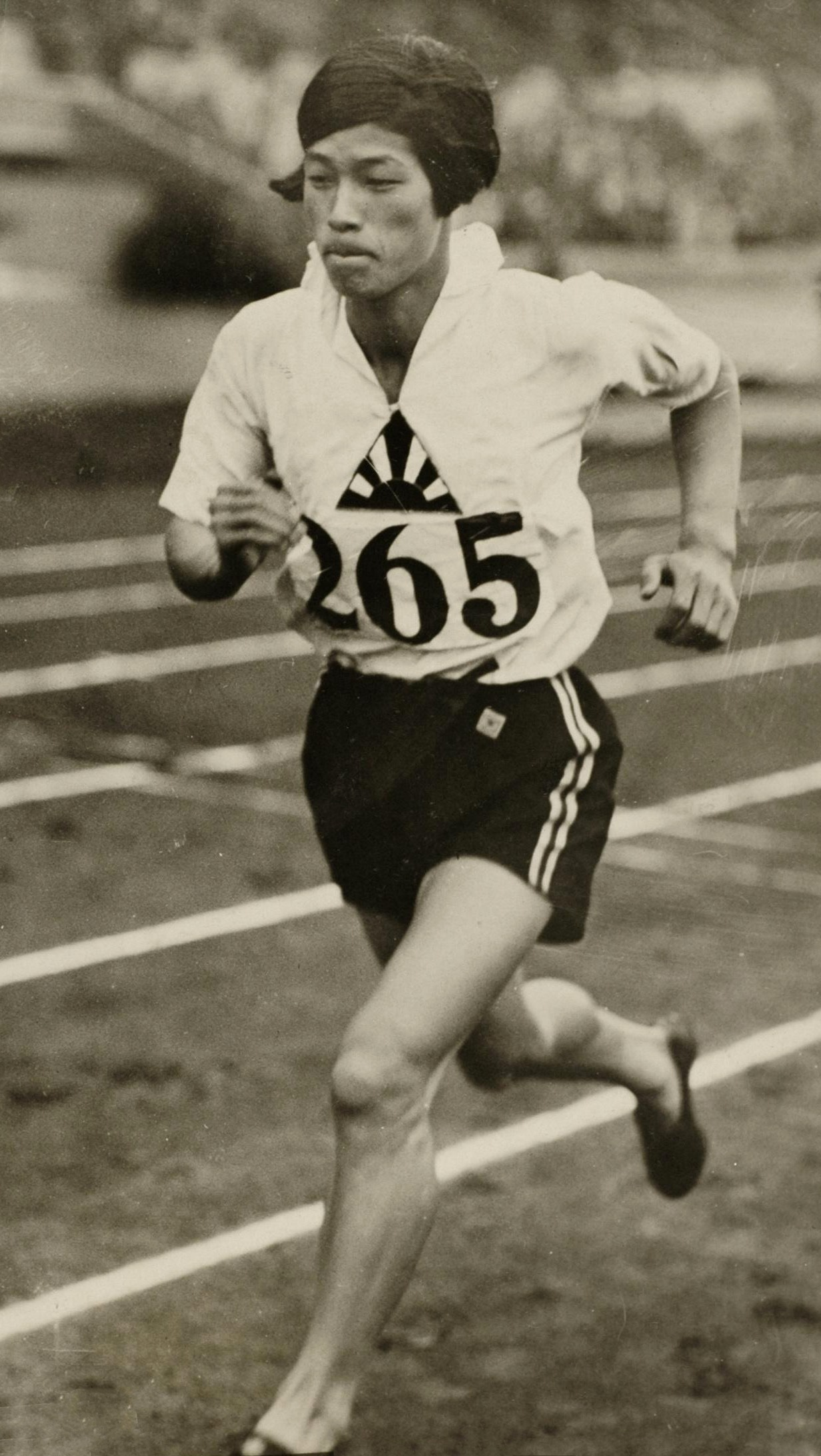 Sport. Sport, Olympische Spelen Amsterdam, 1928 : De Japanse athlete Kinue Hitomi in actie tijdens de 800 meter hardlopen (vrouwen). Ze won zilver.